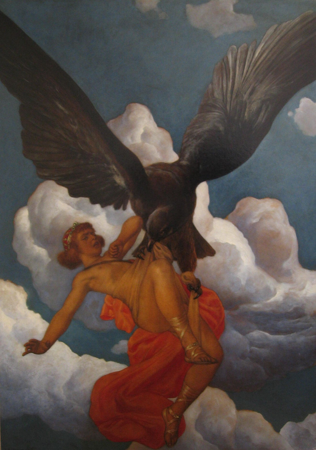 Ganymed. Gemälde von Christian Wilhelm Allers, signiert mit Pseudonym W. Andresen.